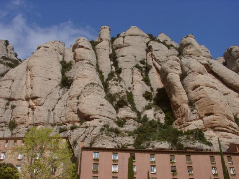 Östlicher Gipfel des Berges Montserrat in der Nähe von Barcelona, im April 2003 fotografiert